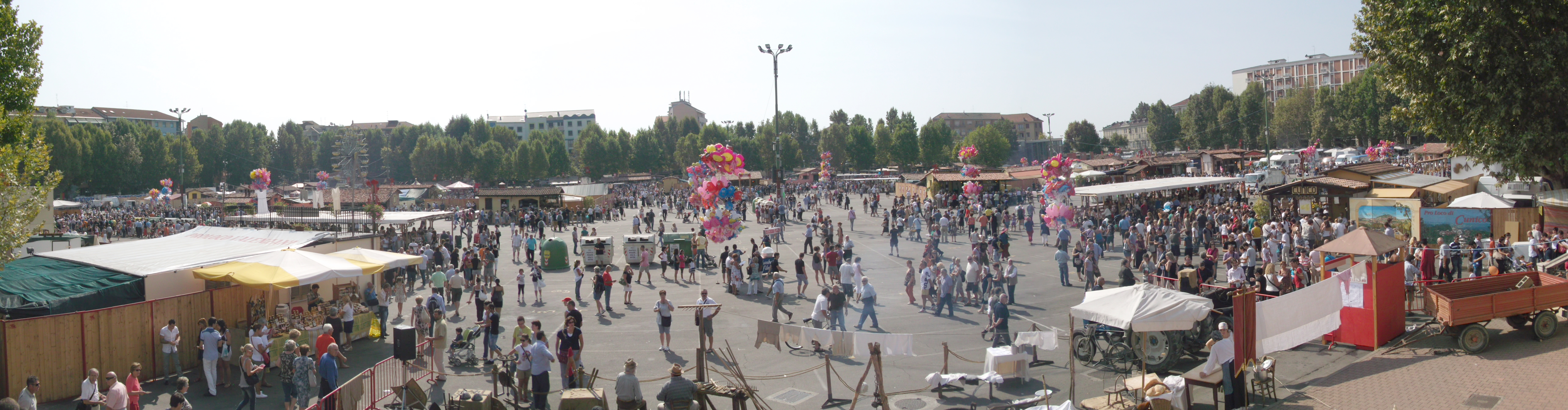 Piazza Campo del Palio, Sagre di Asti